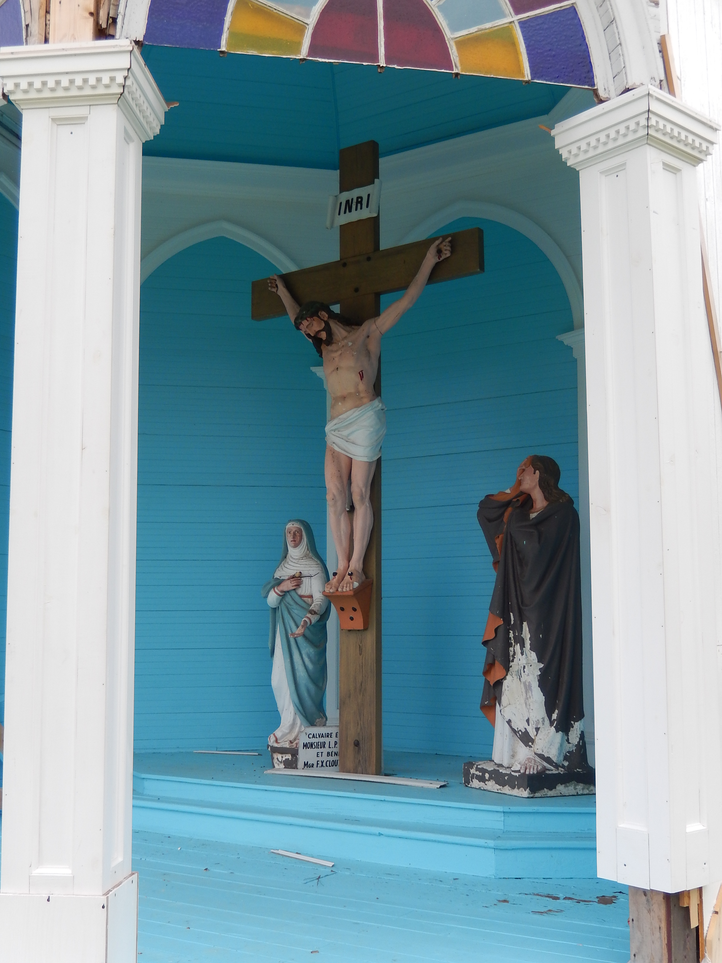 Calvaire Lacoursière, Rang Nord, Batiscan (Canada). (Protection IP cité. Voir la liste des lieux patrimoniaux de la Mauricie pour plus de détails).